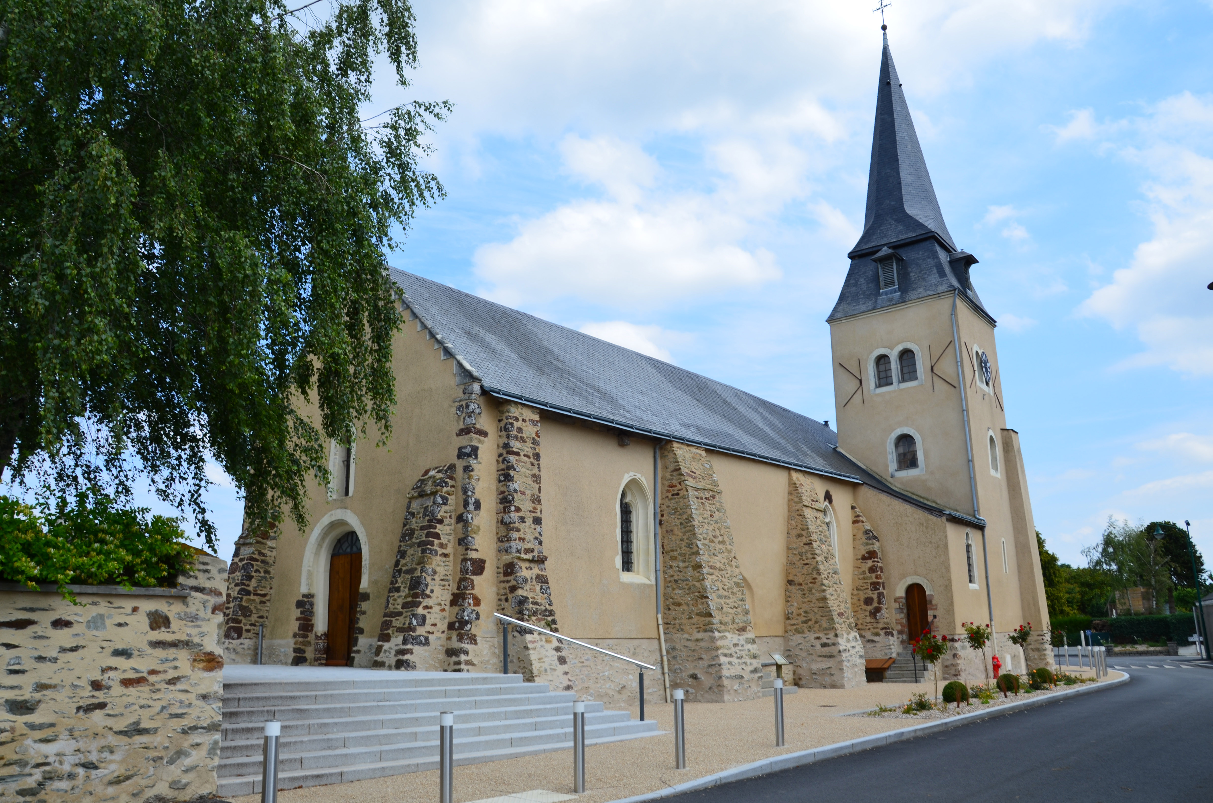 Eglise de Saint-Fort